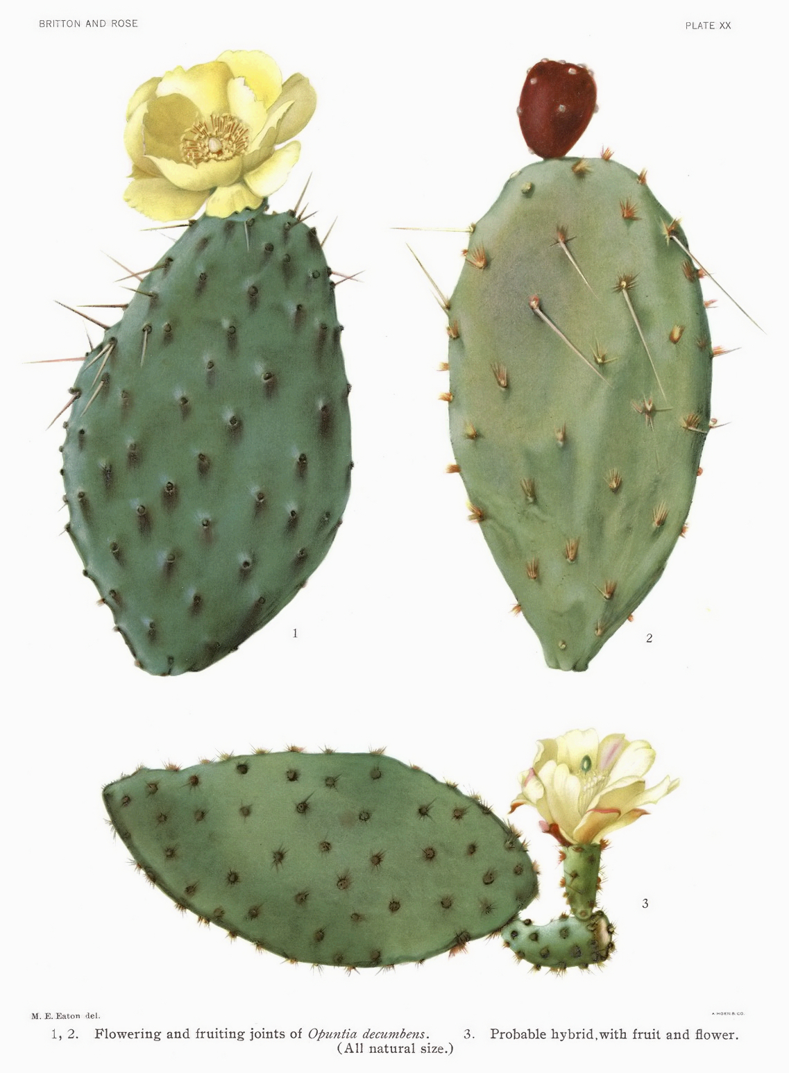 1,2. Opuntia decumbens, 3. Troligen hybrid.